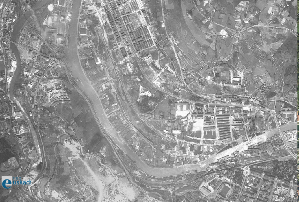 Deustuko kanalaren obrak, 1965an.